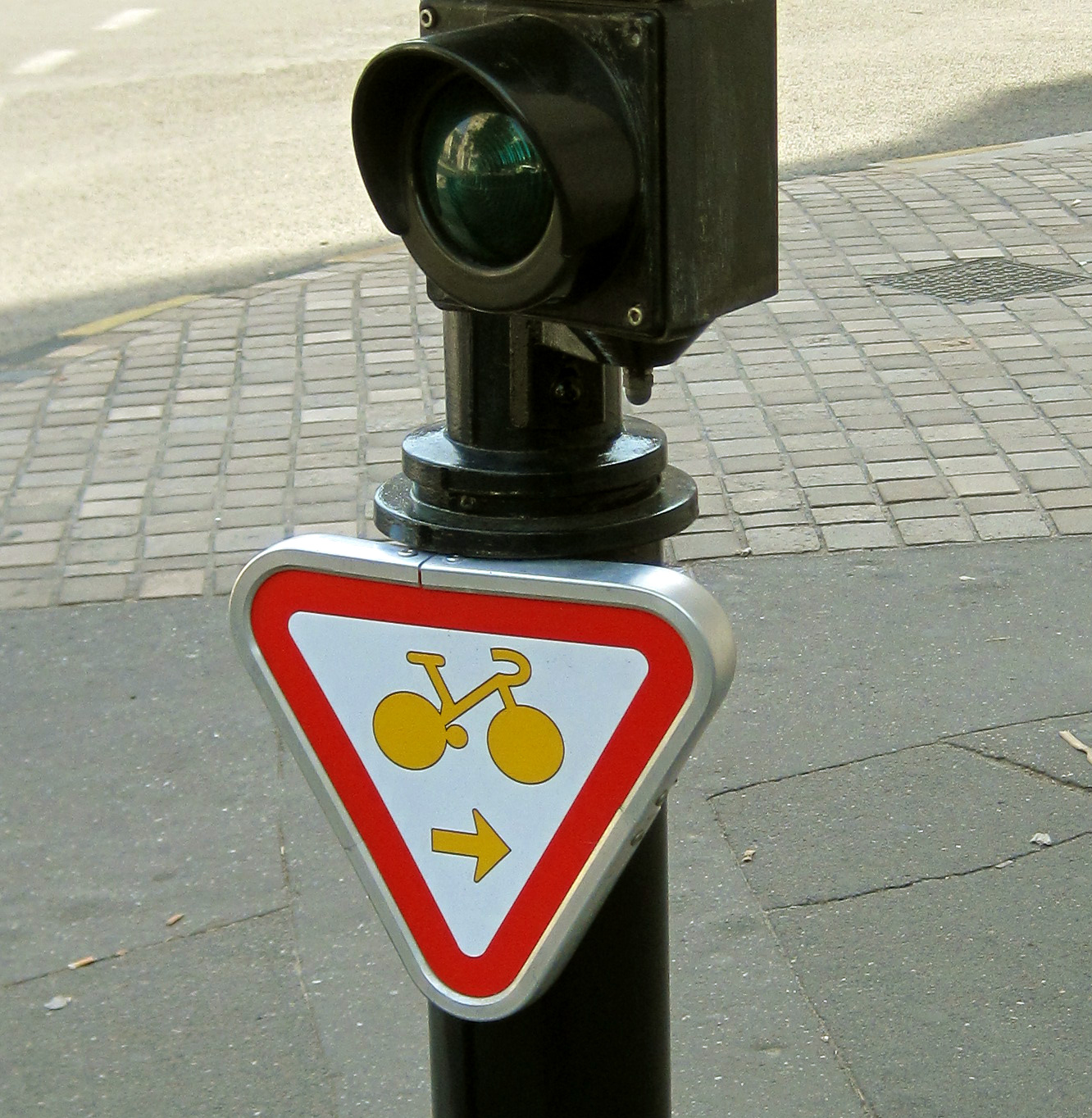 Panneau signalant la possibilité pour les cyclistes de passer au feu rouge s'ils tournent à droite.